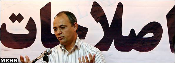 مناظره ای تحت عنوان "خاتمی بیاید یا نیاید" عصر امروز در فرهنگسرای رسانه برگزار شد. قرار بود محسن آرمین و احمد زیدآبادی در این مناظره شرکت کنند که آرمین علیرغم موافقت اولیه حاضر نشد. فواد صادقی از اعضای سایت "آینده" و همچنین عباس پازوکی مسئول سایت اصلاحات در این نشست حضور یافتند.